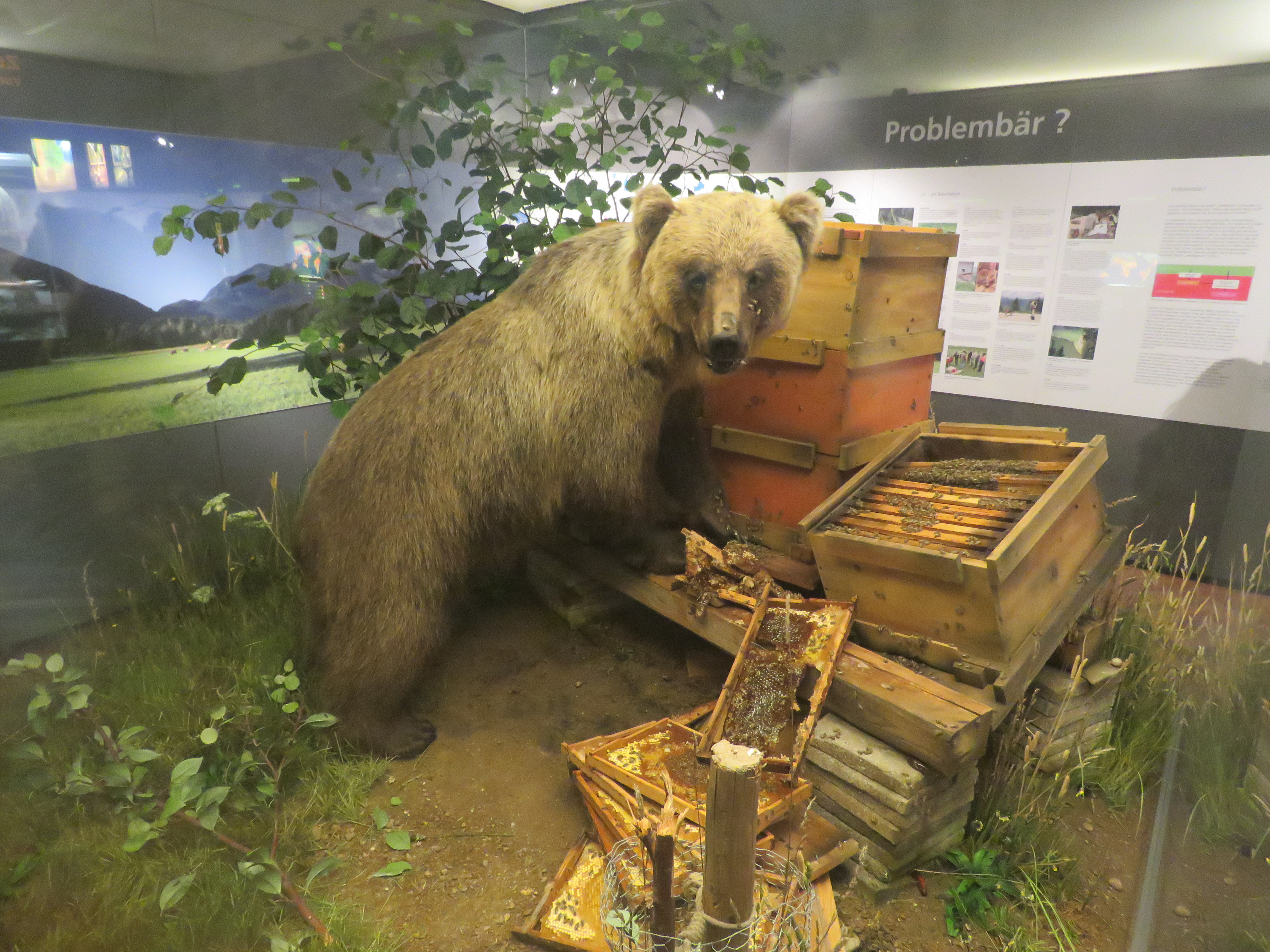 "Problembär" Bruno / JJ1 im Münchner Museum Mensch und Natur (Schloss Nymphenburg)